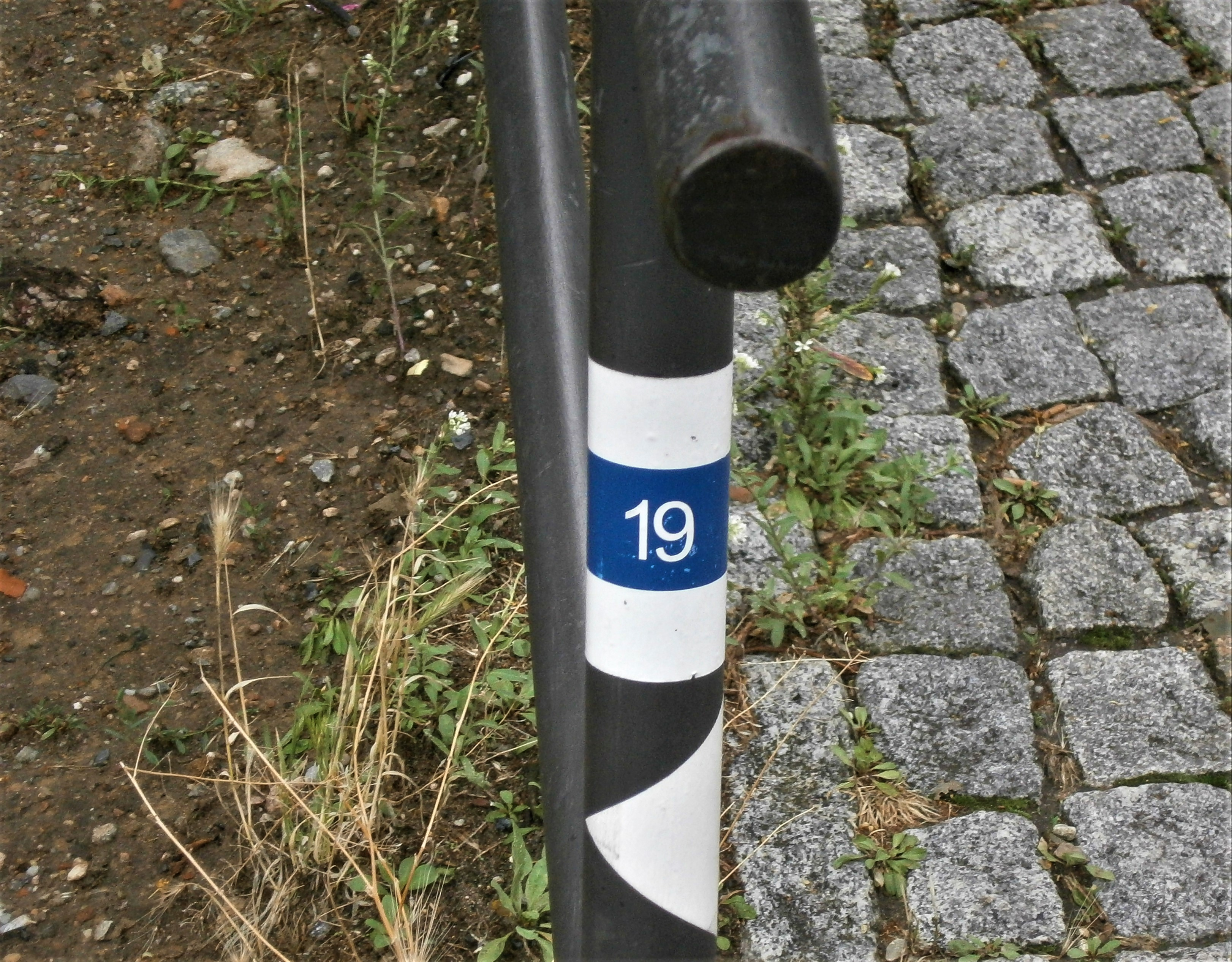 Die Friedenstraße ist eine Straße im Berliner Bezirk Friedrichshain-Kreuzberg, Ortsteil Friedrichshain. Angelegt und benannt wurde sie 1871-1876 auf dem Communicationsweg außerhalb der abgerissenen Berliner Zollmauer. Bereits seit dem Anlegen und der Bebauung bestand eine Teilung der Straße auf Königstadt und Stralauer Viertel. Aktuell sind es drei unterschiedene Straßenabschnitte: regionale Straßenverbindung im Barnimkiez am Volkspark Friedrichshain, am Platz der Vereinten Nationen als Parkzone, südlich im (Planungsraum) "Friedenstraße" als Ergänzungsstraße.